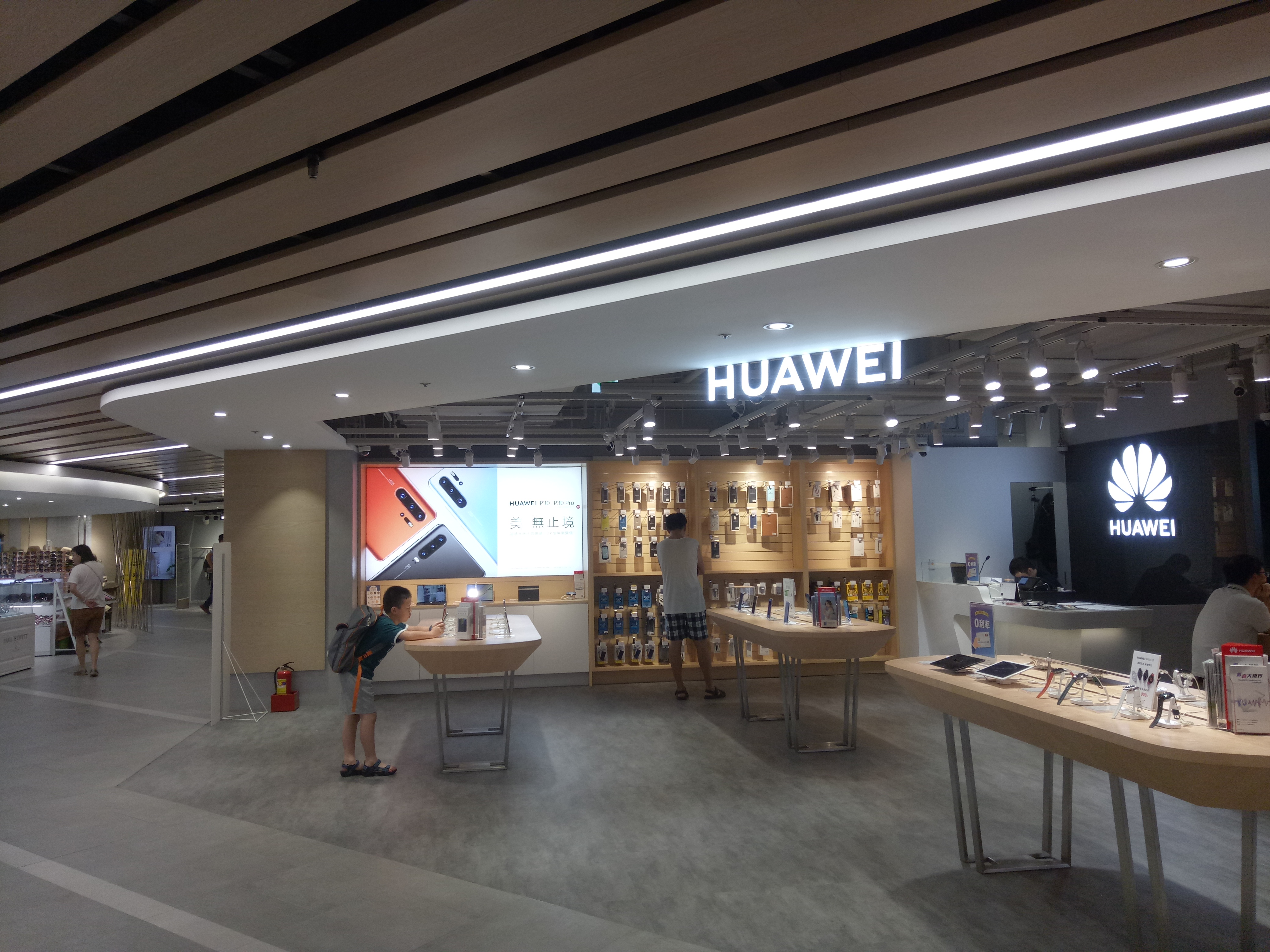 桃園市統領廣場2F，華為體驗店。